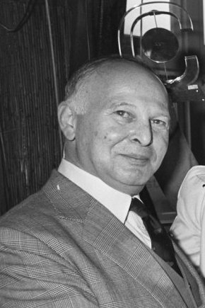 Luv' ontvangt de Conamus Exportprijs uit handen van violist Theo Olof